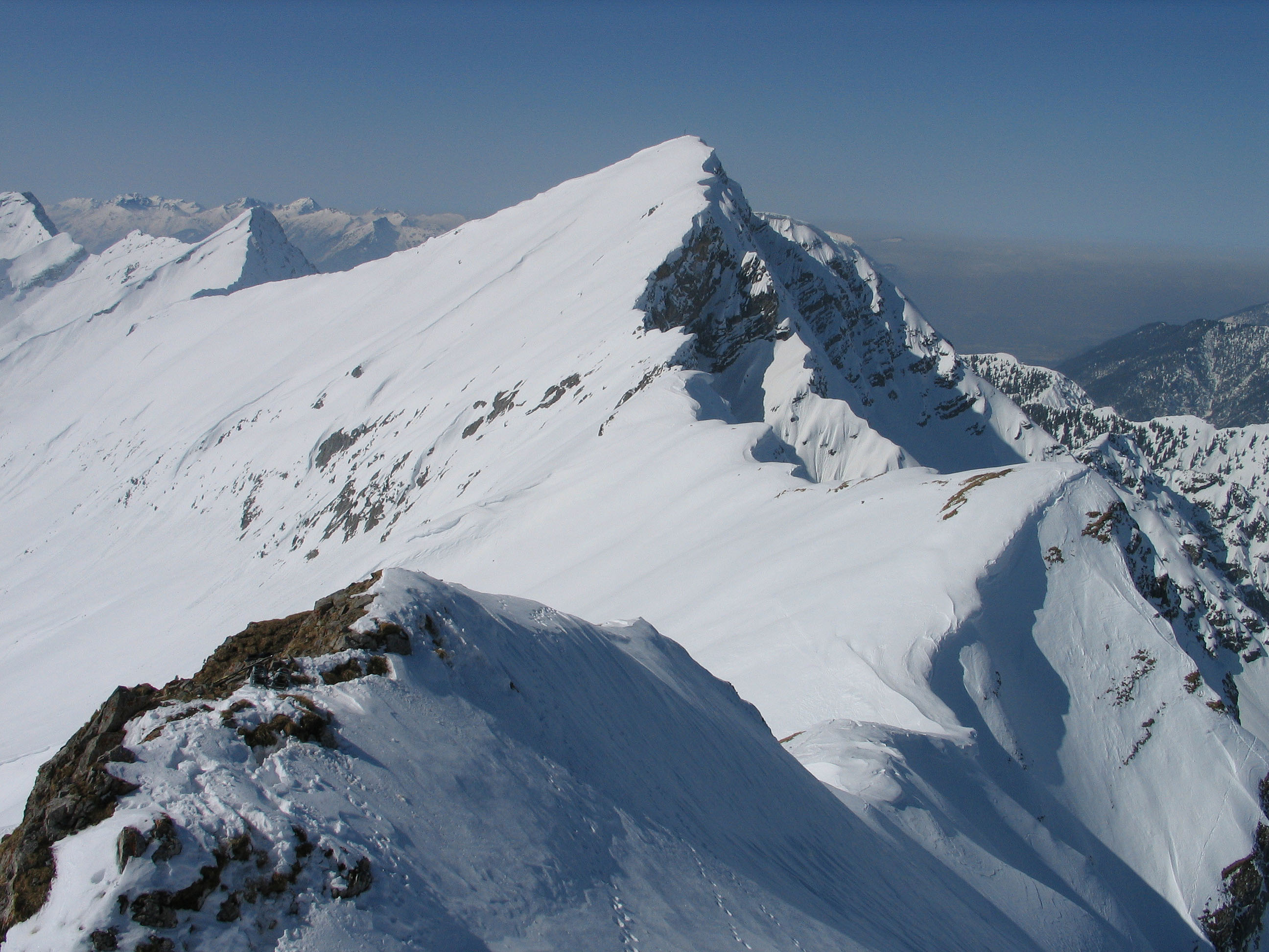 Hochschrutte, Plattberg, Ammergauer Alpen